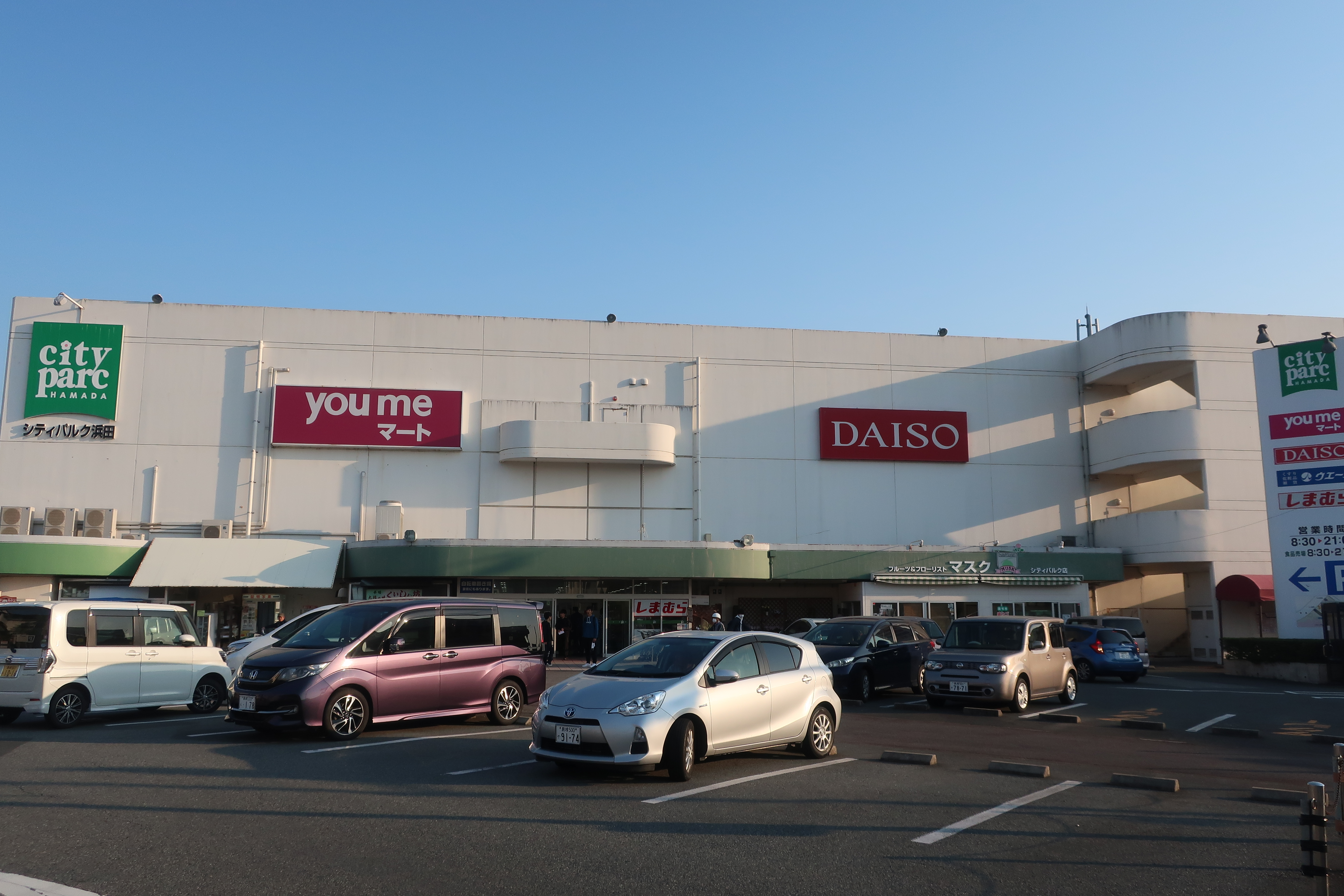 ゆめマート浜田の前面写真。